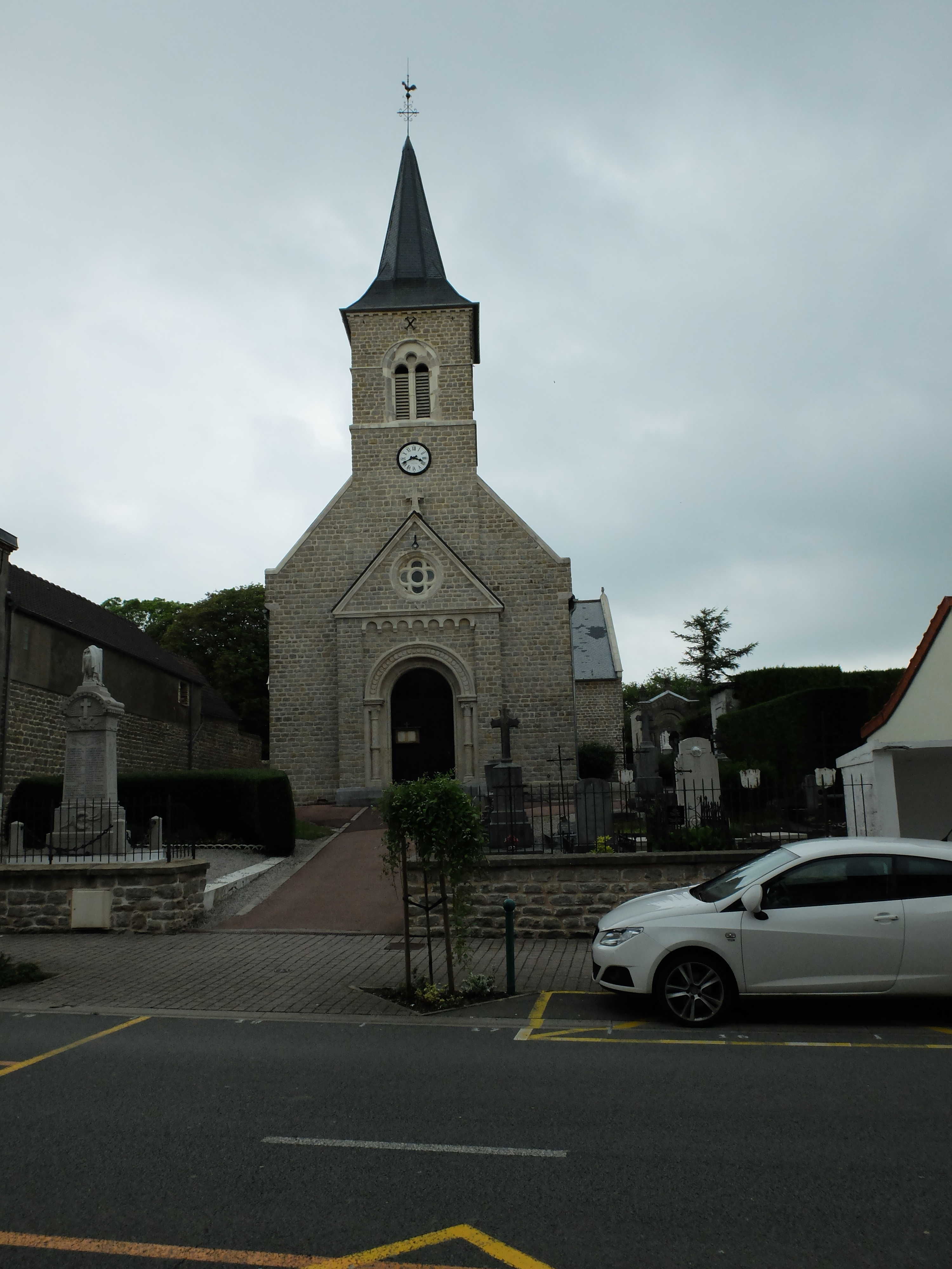 Vue de l'église Saint-Jean-Baptiste et du monument aux morts de La Capelle-lès-Boulogne.